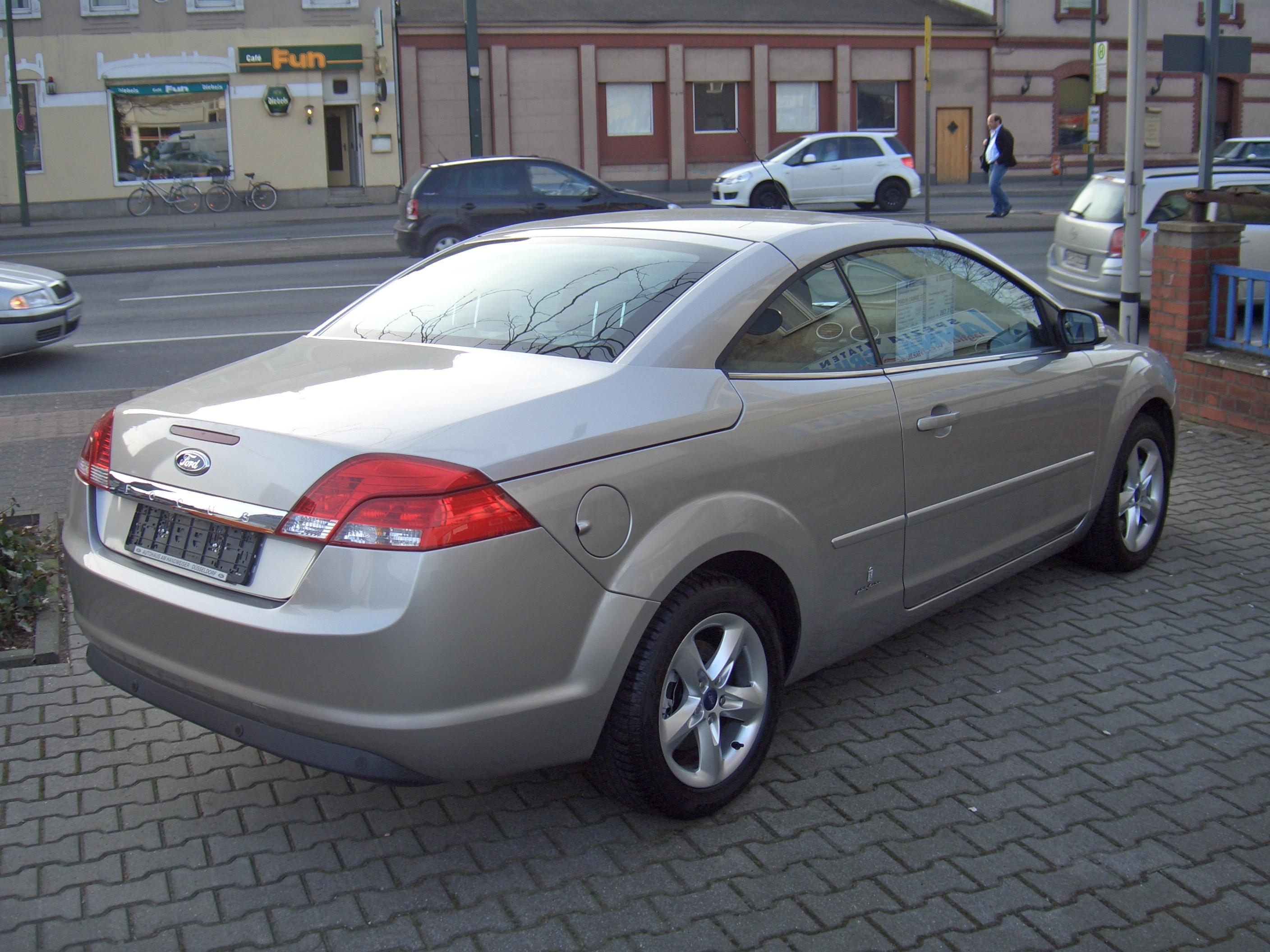 Ford Focus Coupé-Cabriolet 2.0, C307 Mk.II (2009)